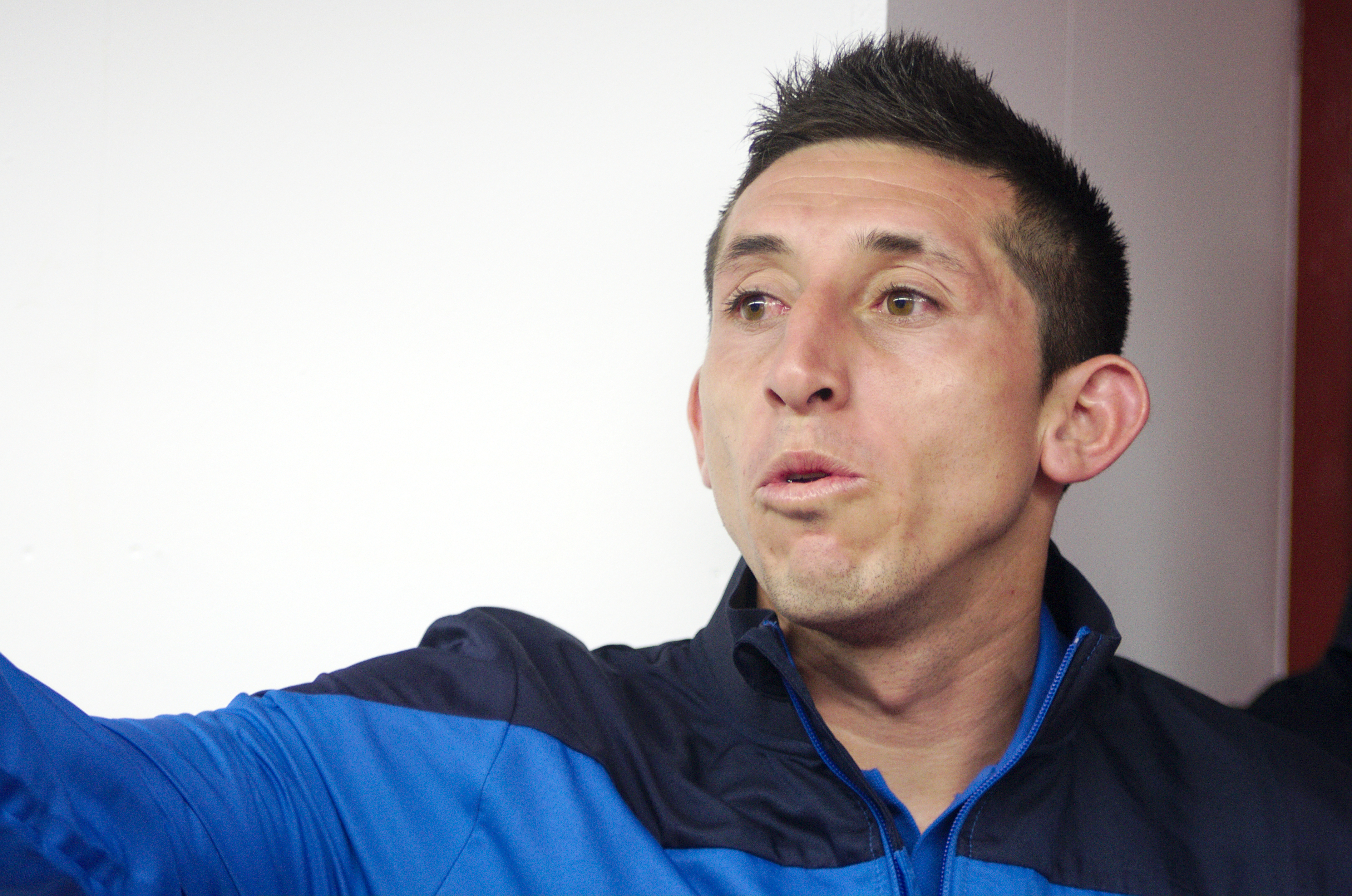 Valais Cup 2013 - OM-FC Porto - 20130713 - Herrera